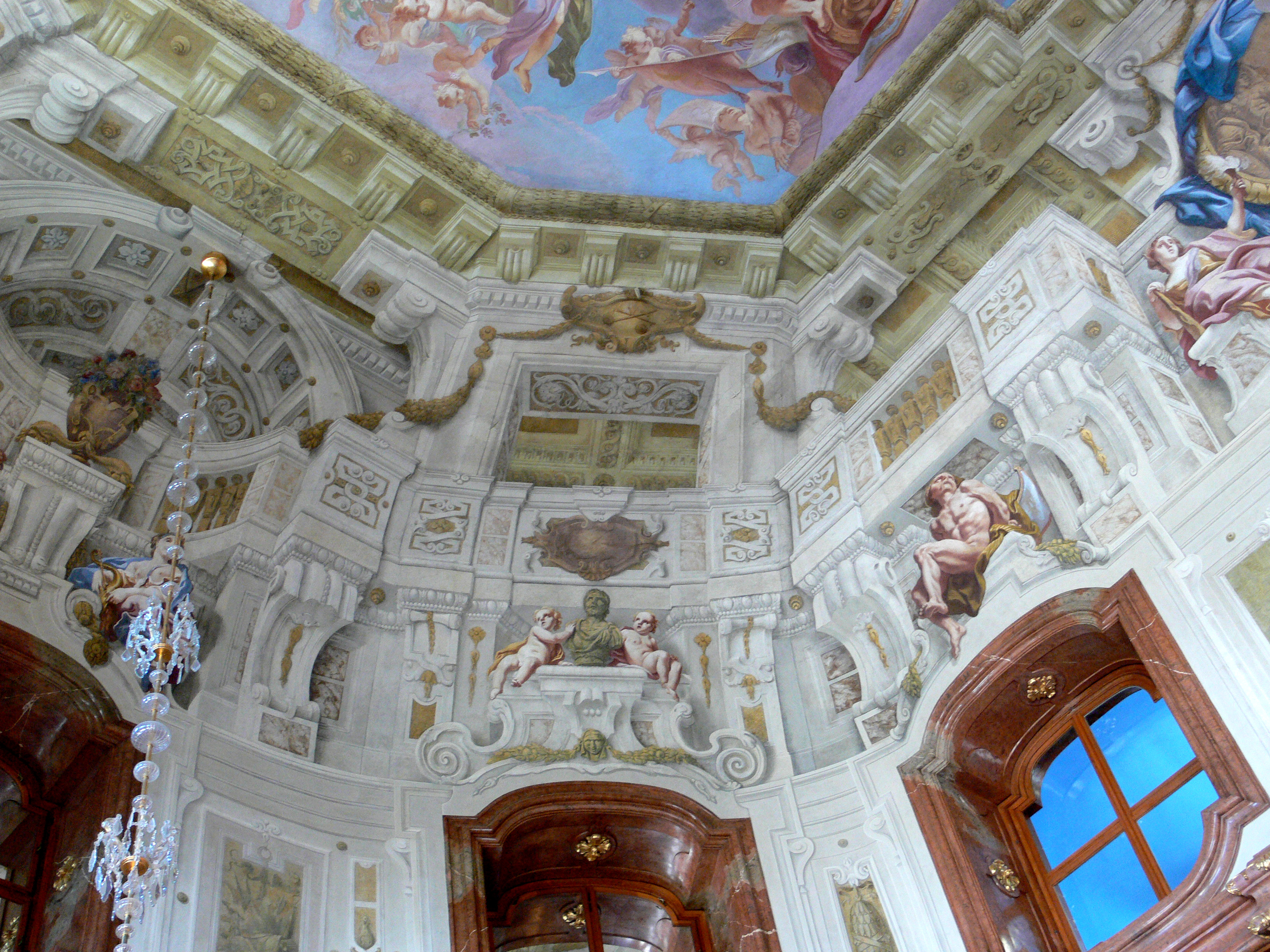 Wien, Oberes Belvedere, Marmorsaal, Deckengemälde von Carlo Carlone